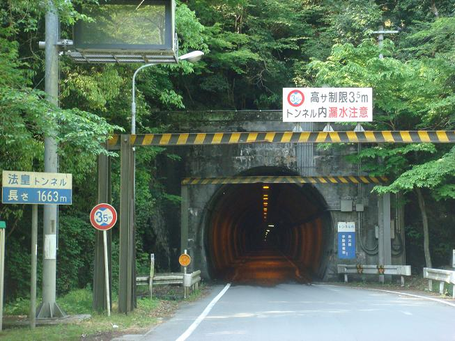 国道319号法皇トンネル 四国中央市金砂町で撮影